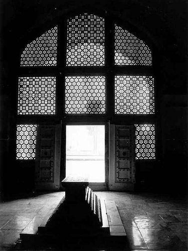 Akbar's tomb, near Agra, India